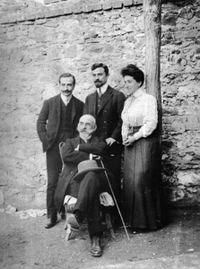 Димитриос Занас (седнал), Константинос Занас, Алкивиадис Малтос, Ифигения Зана-Малто.